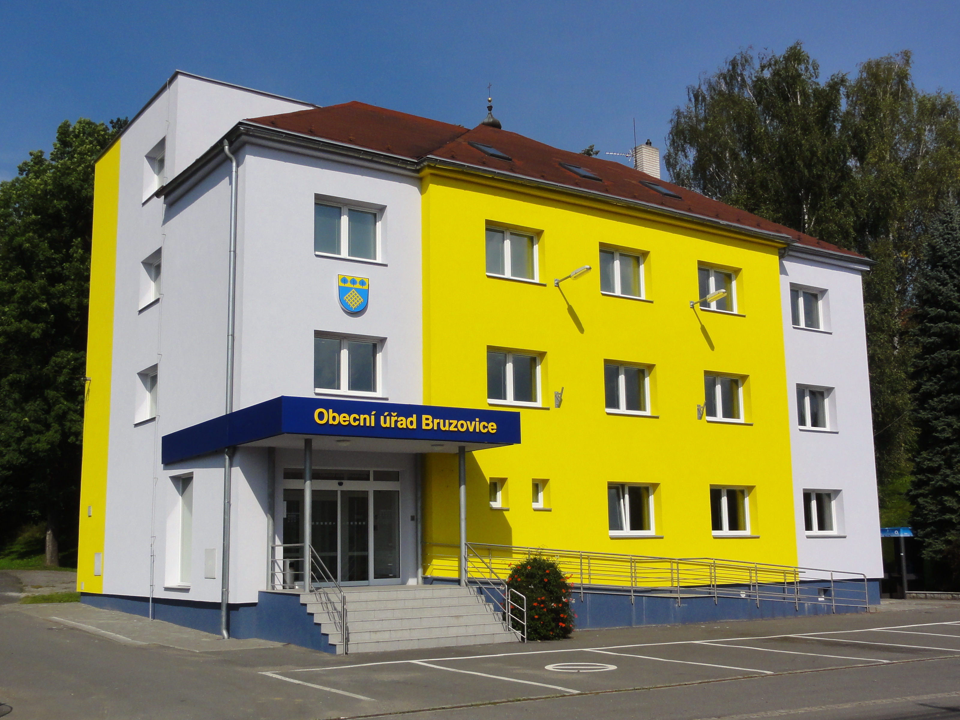 Bruzovice, Obecni úřad